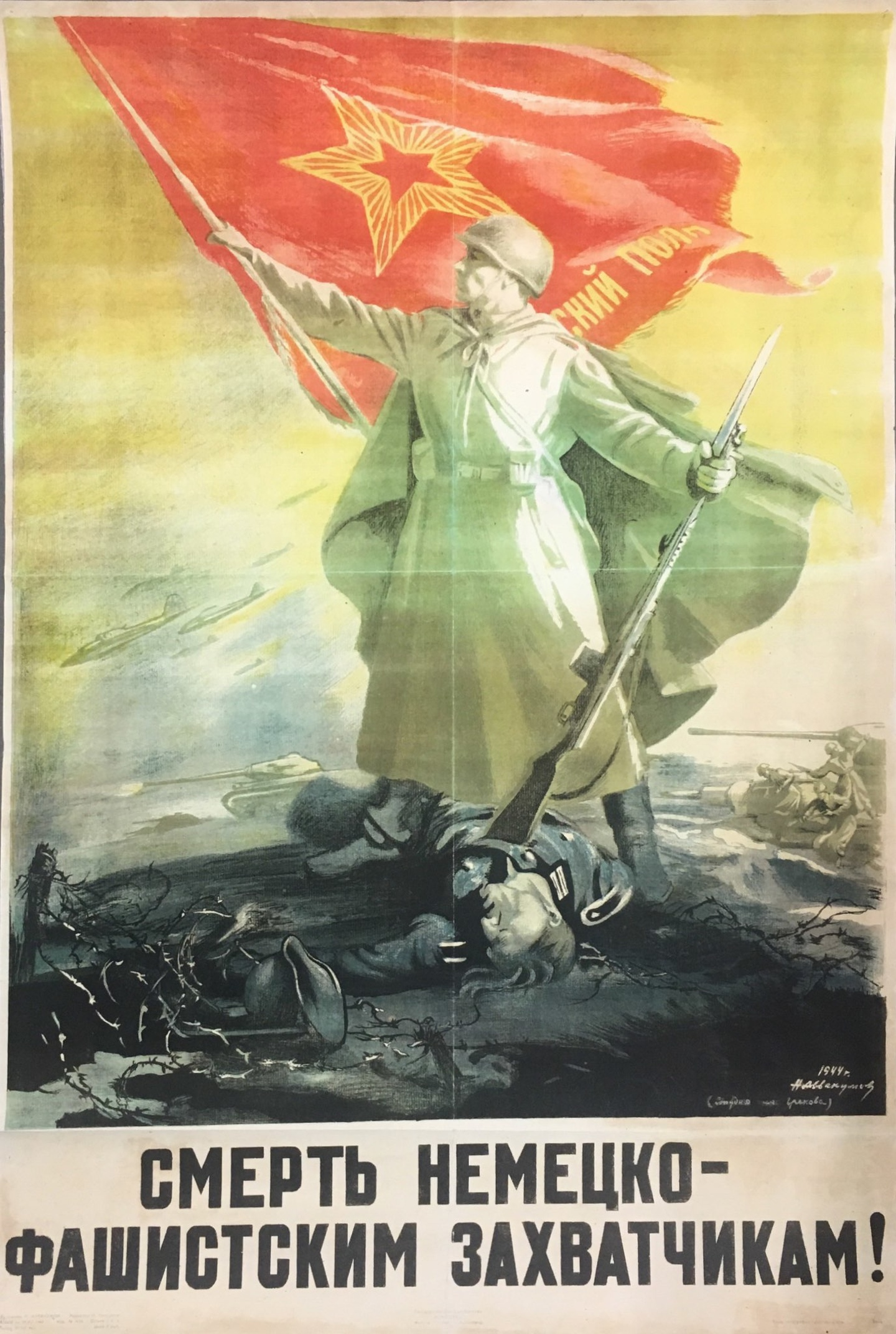 Смерть немецко-фашистским захватчикам!